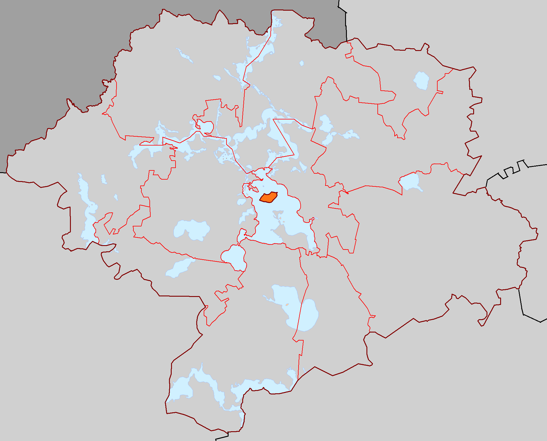 Городской округ ЗАТО Солнечный в окружении Осташковского городского округа